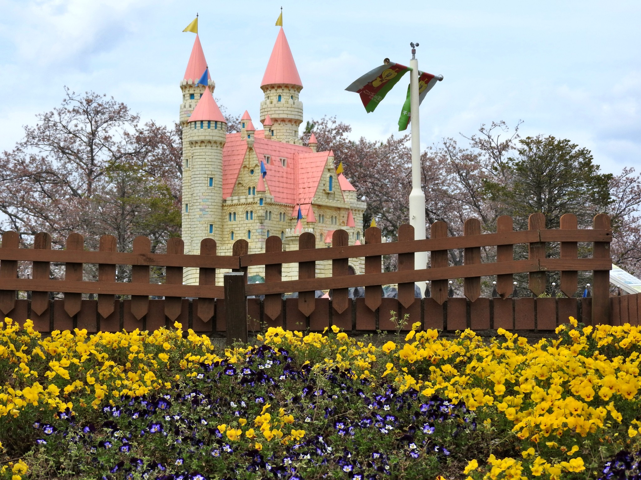 CC-BY-2.0 で Flickrにアップロードされていた画像。 「NakaoSodanshitsu」氏による「千葉こどもの国 07」。